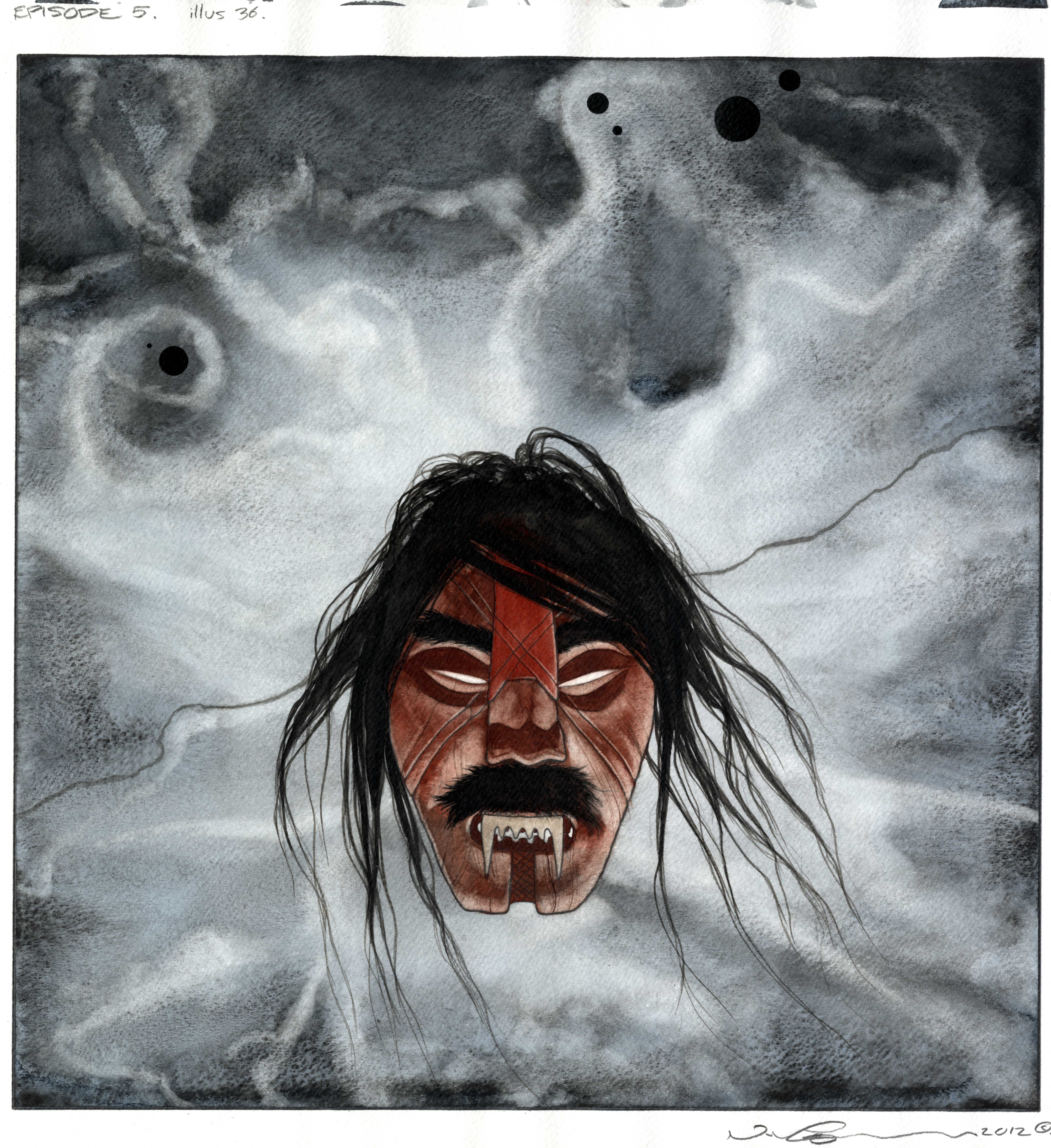 Tegningen er en del af udstillingen Qanga, som bygger på tegneren og grafikeren Nuka. K Gotfredsens firebindsværk Oqaluttuaq (Fortællinger).